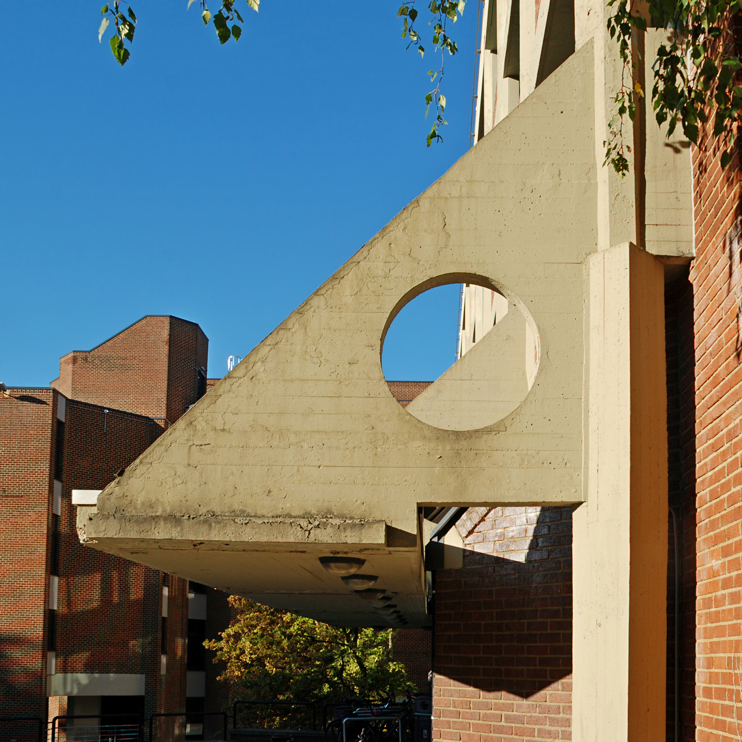 Belgique - Brabant wallon - Louvain-la-Neuve - Place Louis Pasteur - Mercator